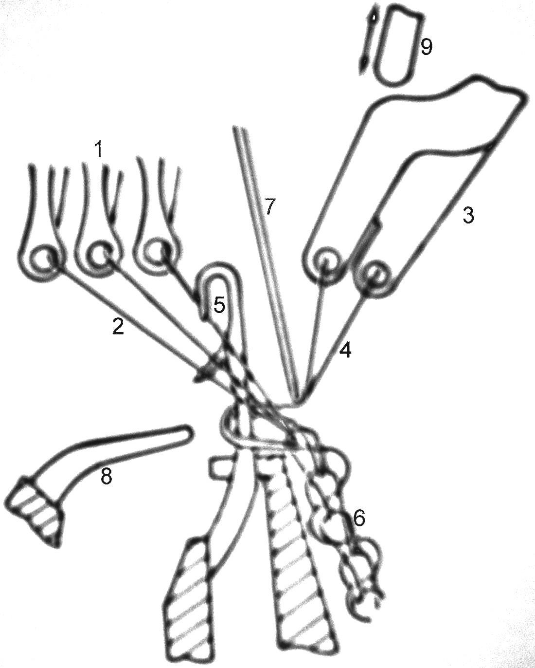 Wirkwerkzeuge am Raschel